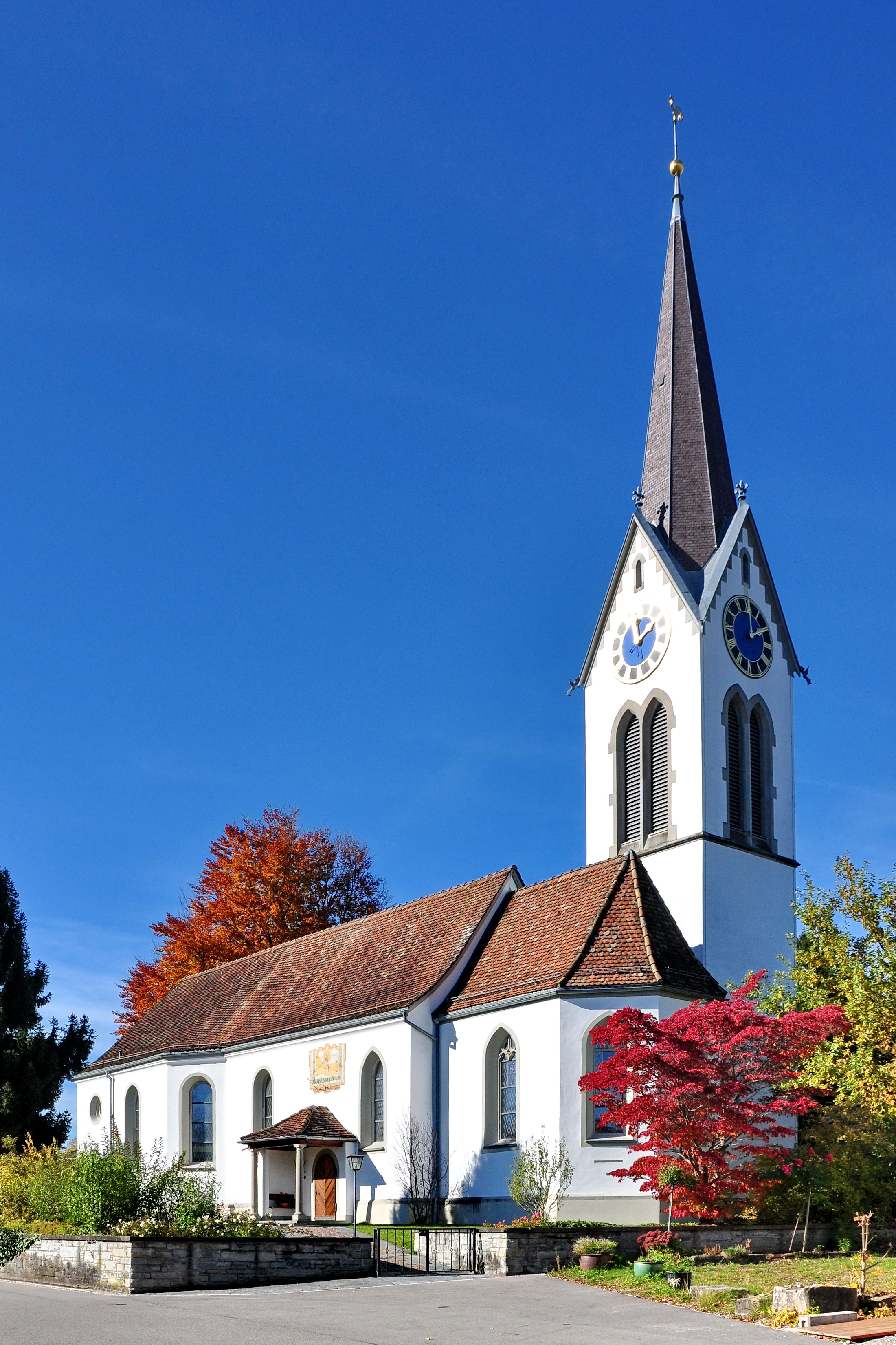 Reformierte Kirche in Bubikon (Switzerland)